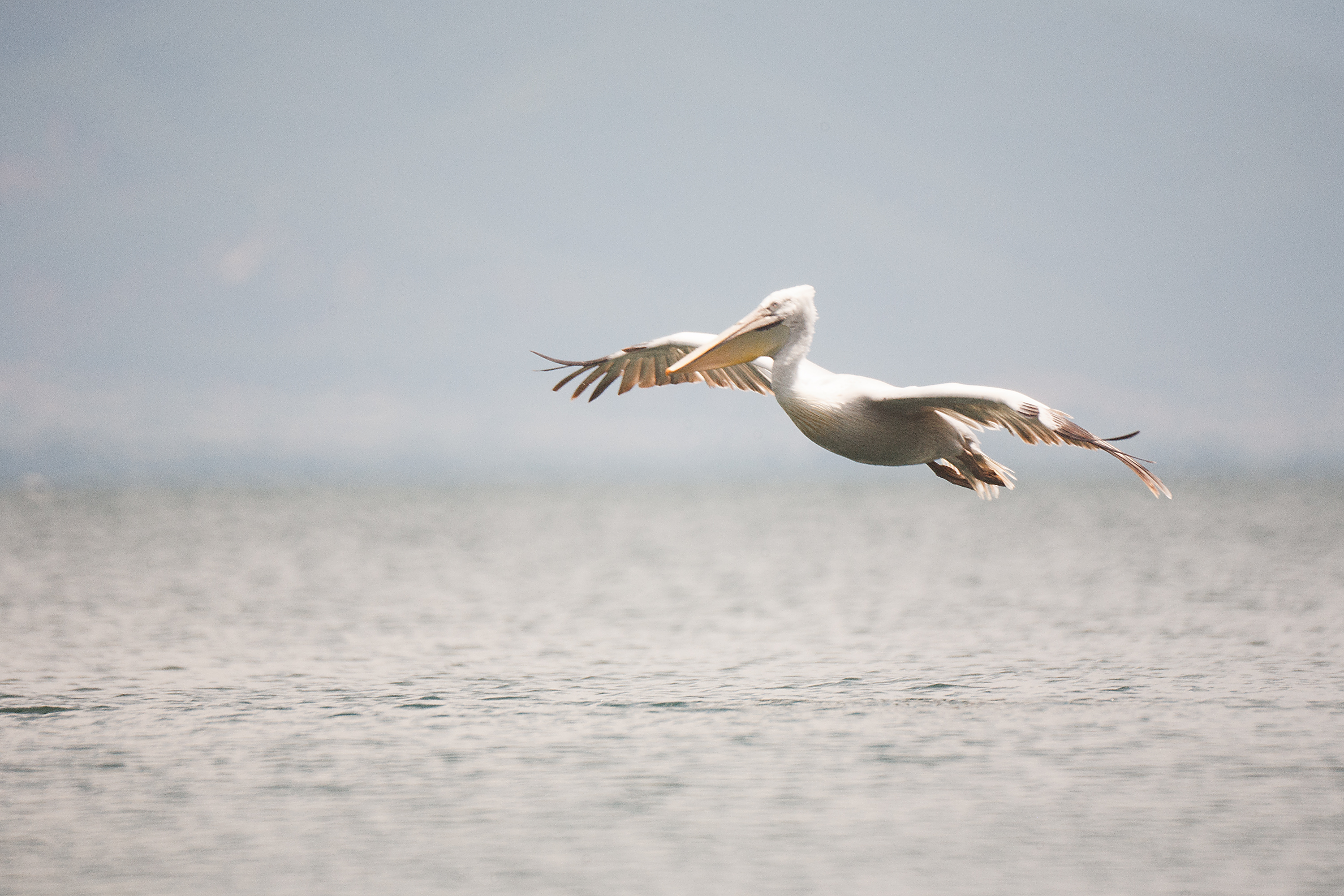 Pelikan vo brisecki let nad Prespa